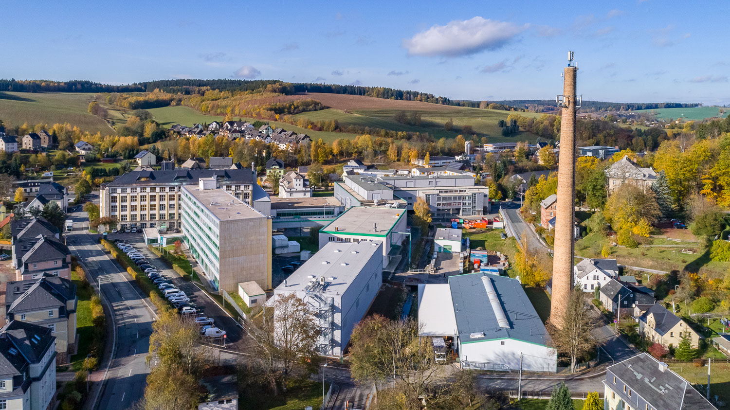 Luftaufnahme des Werkes in Gornsdorf